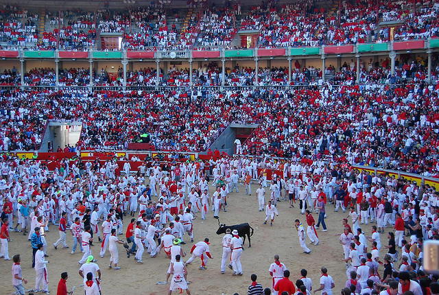 Plaza de toros Pamplona